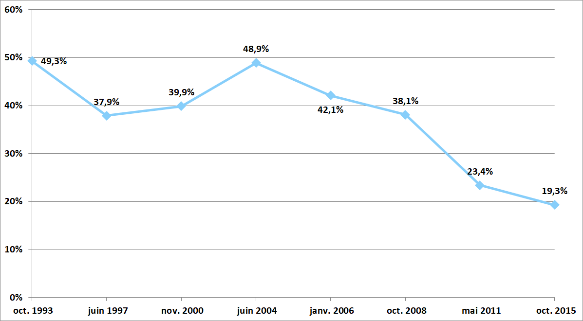 Graphique des voix obtenus par le Bloc québécois au Québec entre 1993 et 2015.